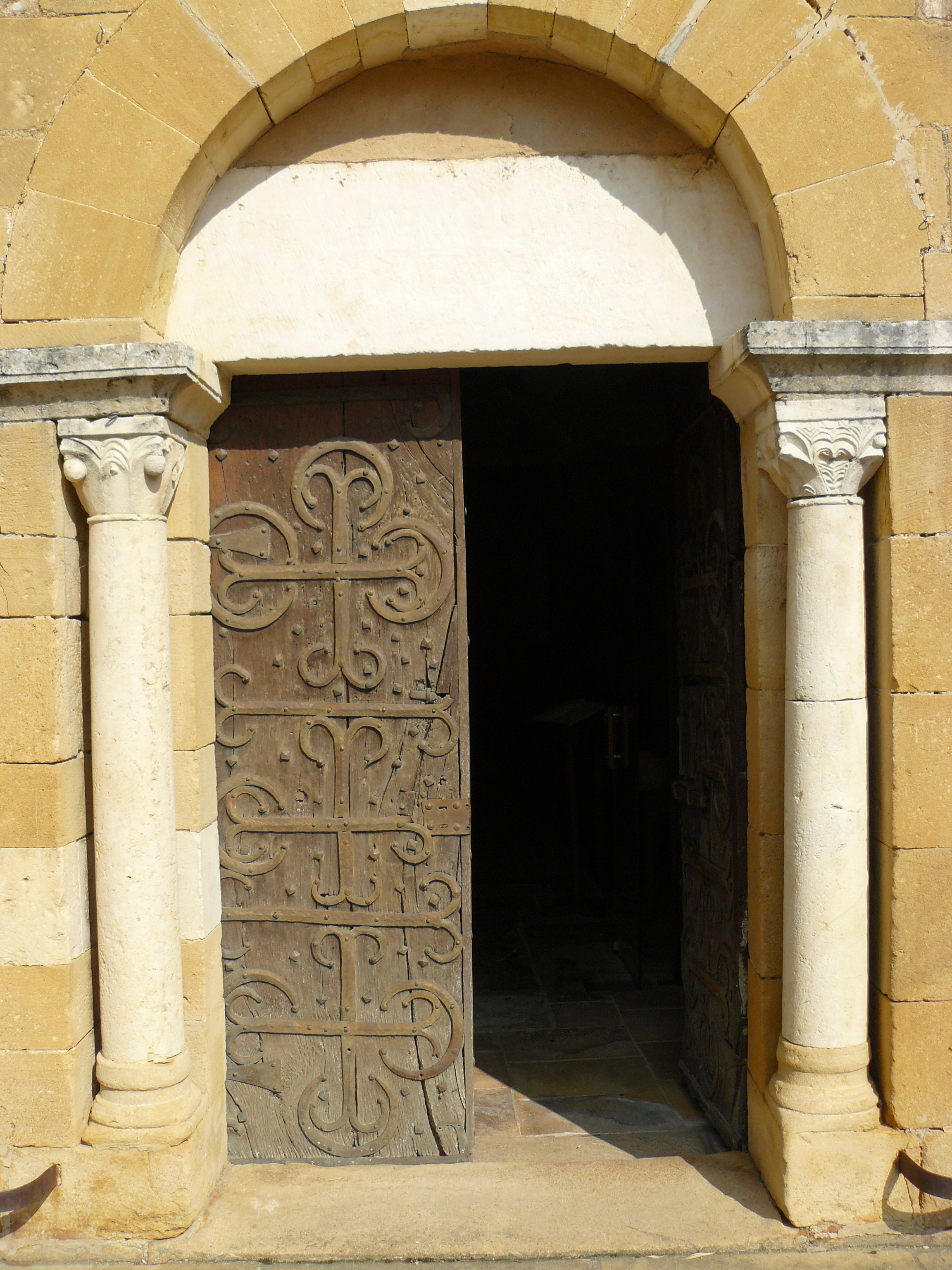 Église Saint-Dutrille de Frontenas, (Inscrit, 1926) .